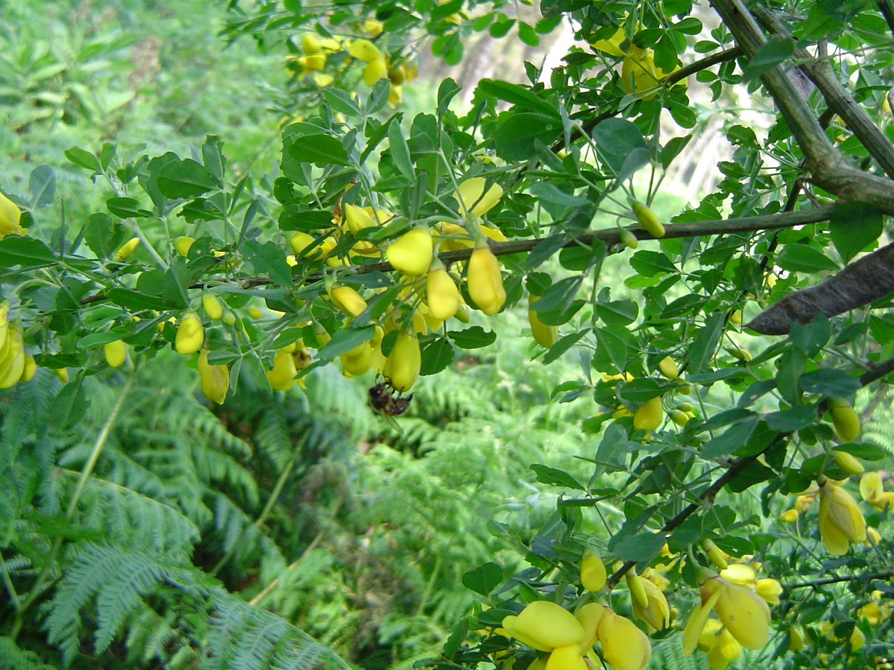 Cytisus arboreus (Desf.) DC., Ceuta, España